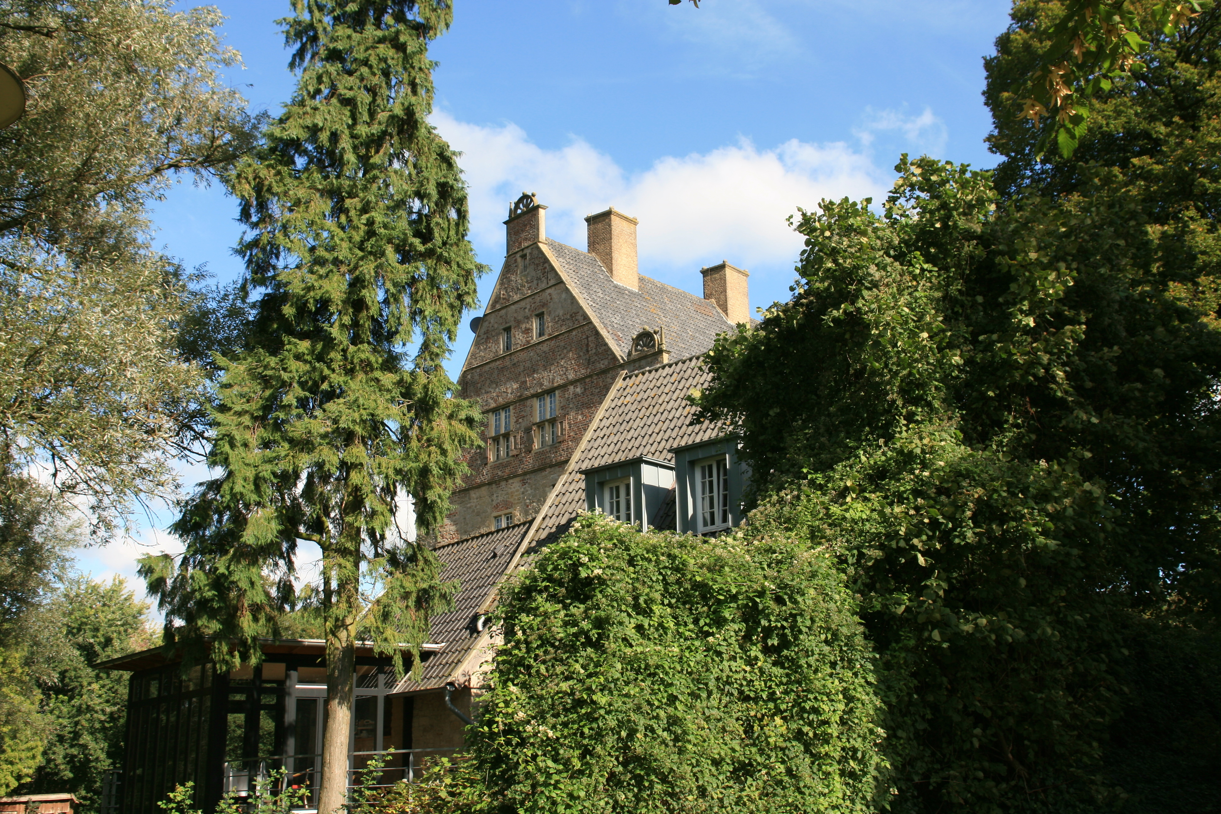 Hohes Haus, Burg 18 in Nienborg, Heek